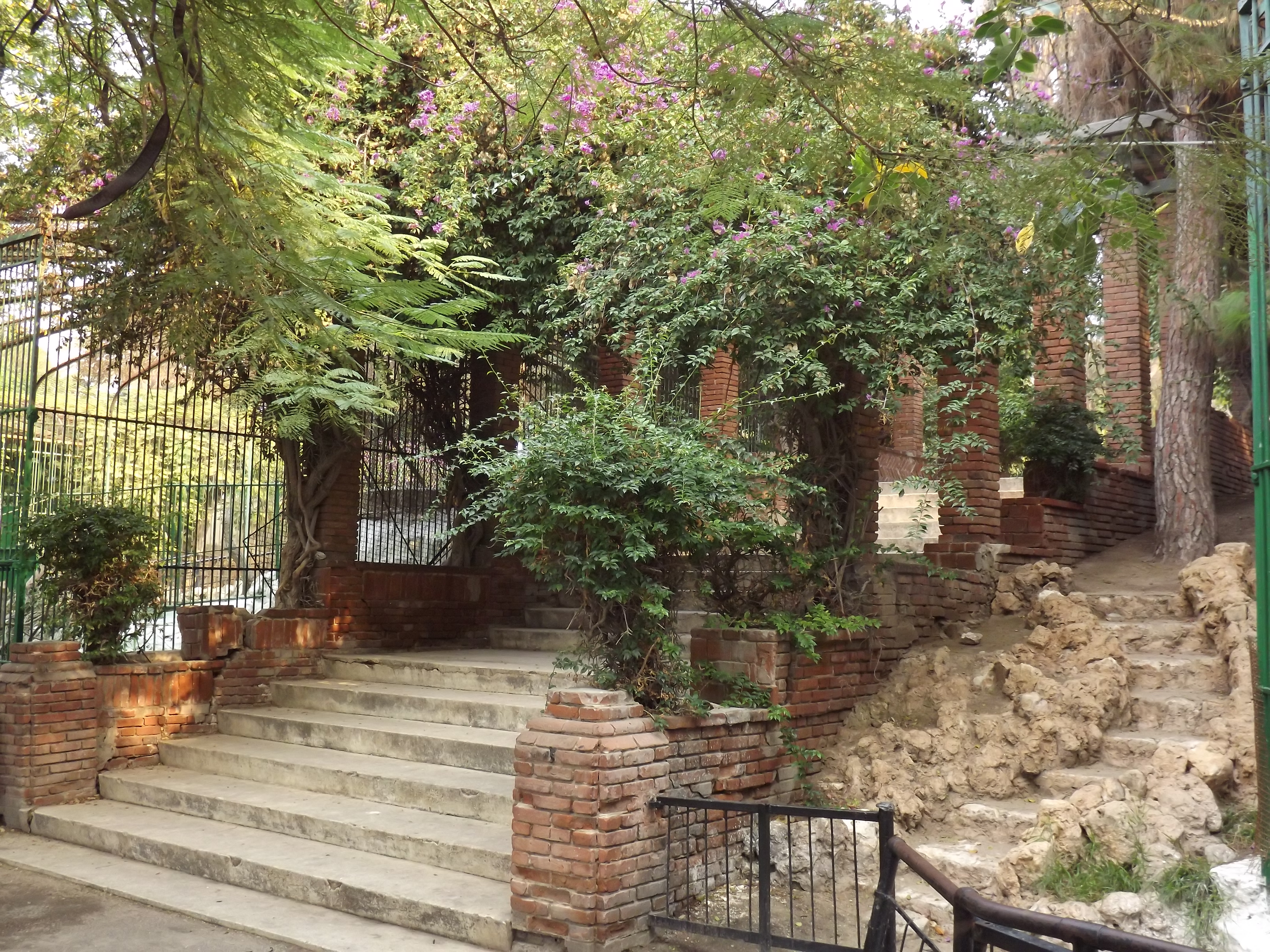 حديقة حيوان النزهة - الاسكندرية